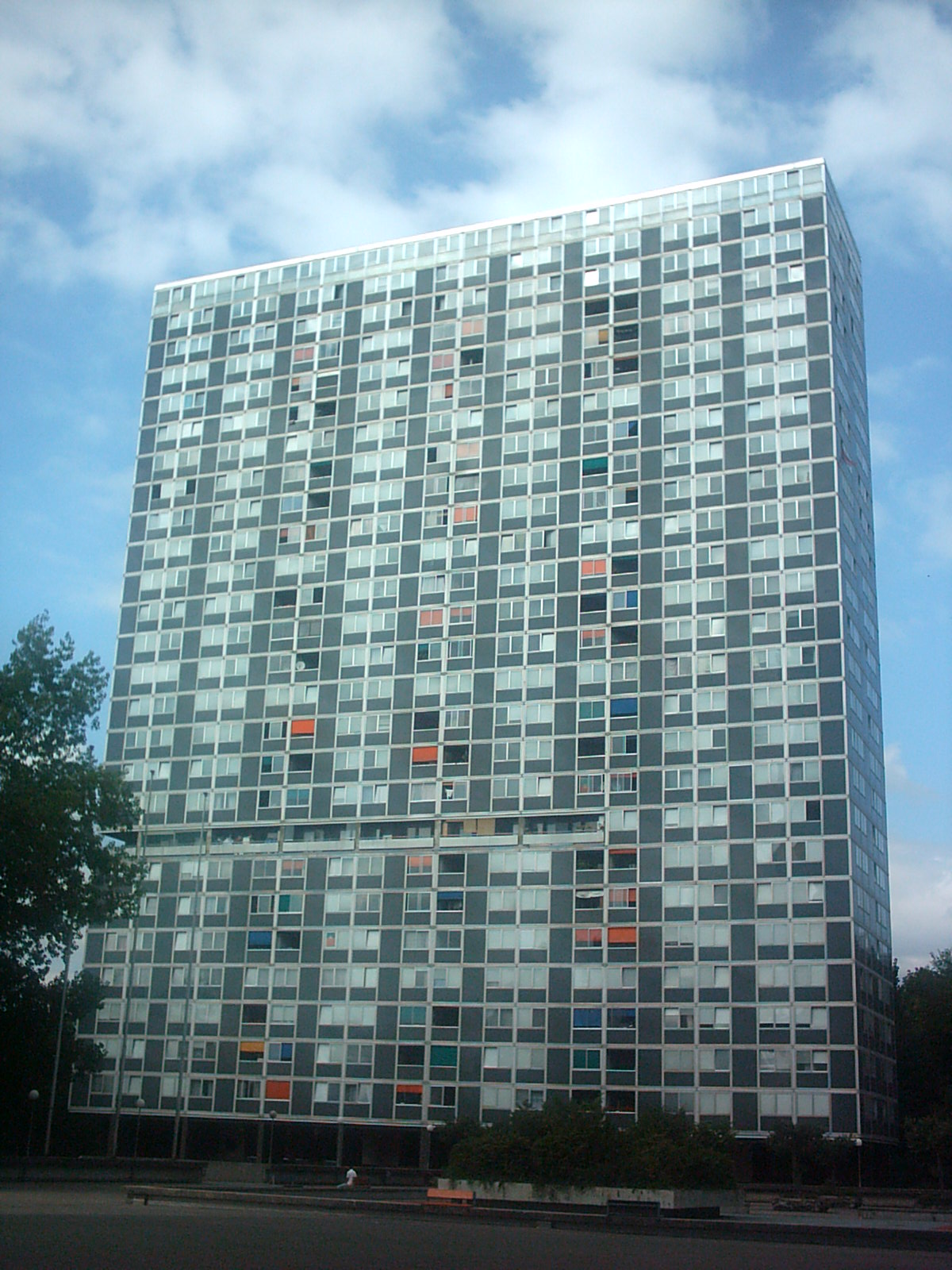 Tour du Lignon à Vernier (Suisse)